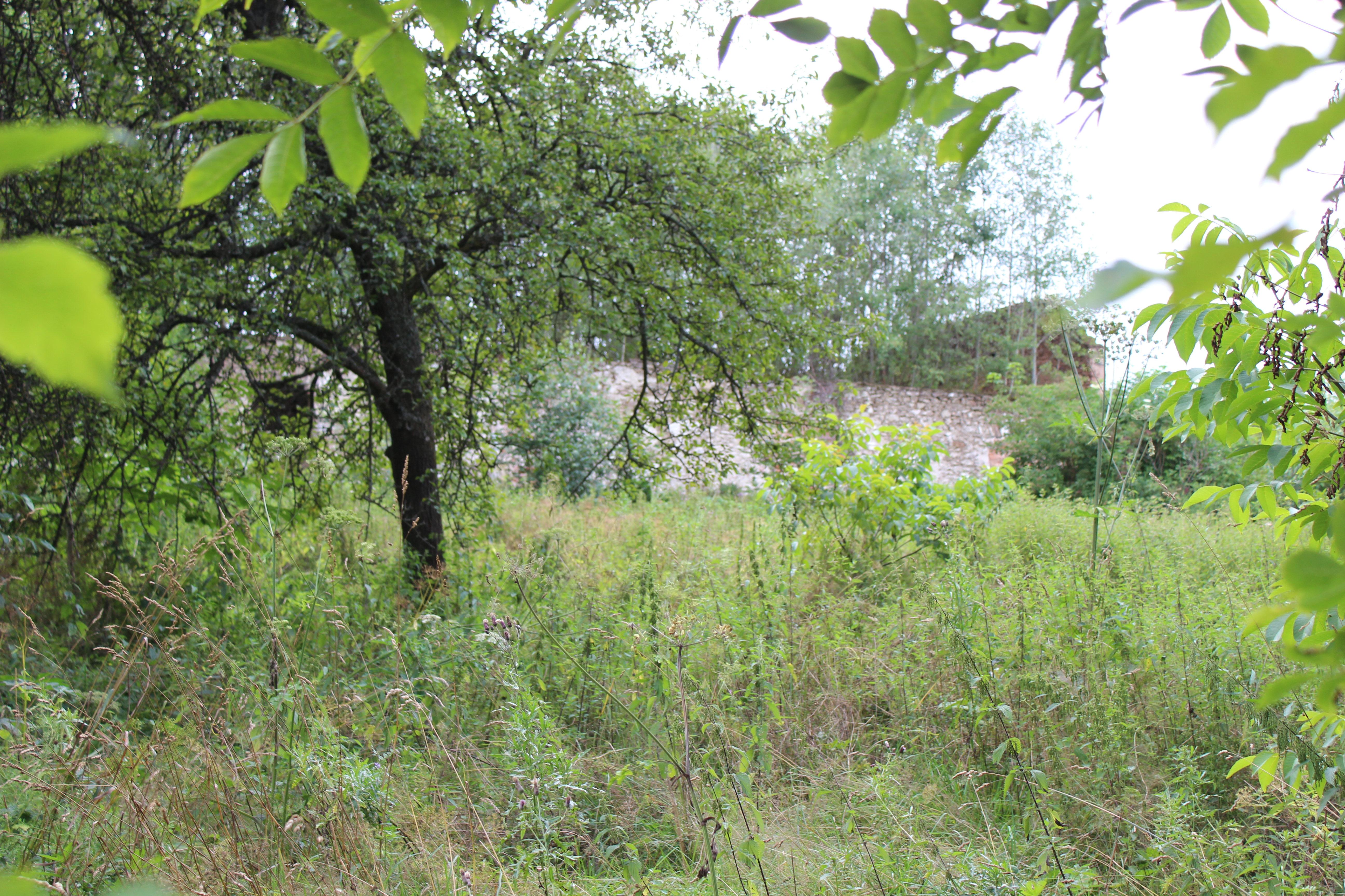 Zbořeniště domu v Trpěšicích.